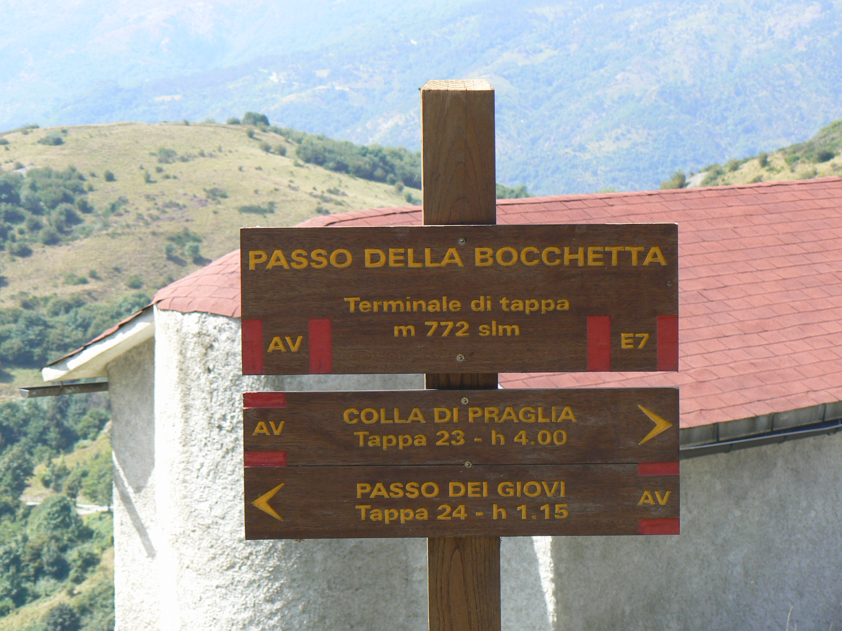 Terminale di tappa 23 dell'AVML al passo della Bocchetta